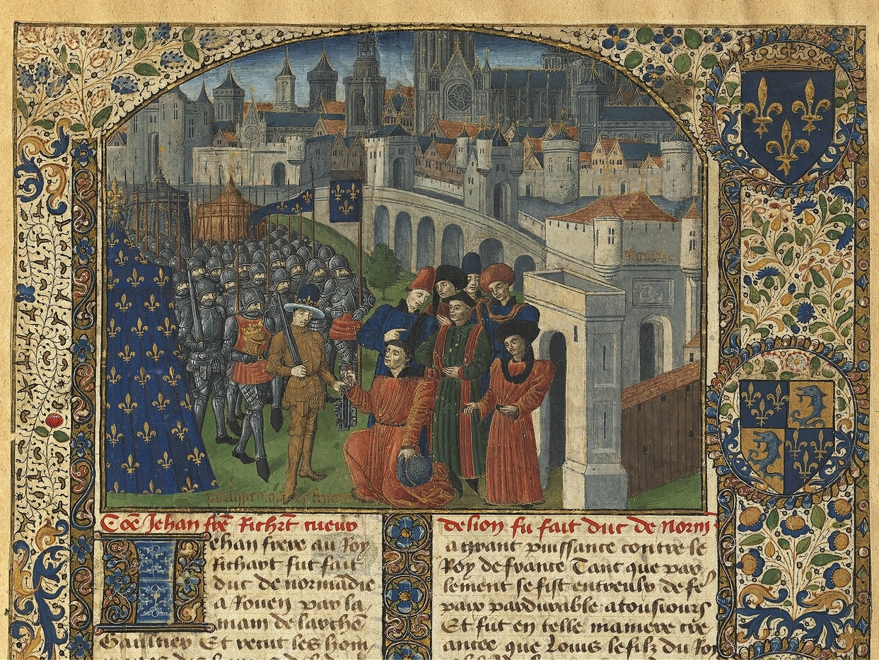 BnF Français 2623 Chronique de Normandie Fol. 106bis - Reddition de Rouen (1204)